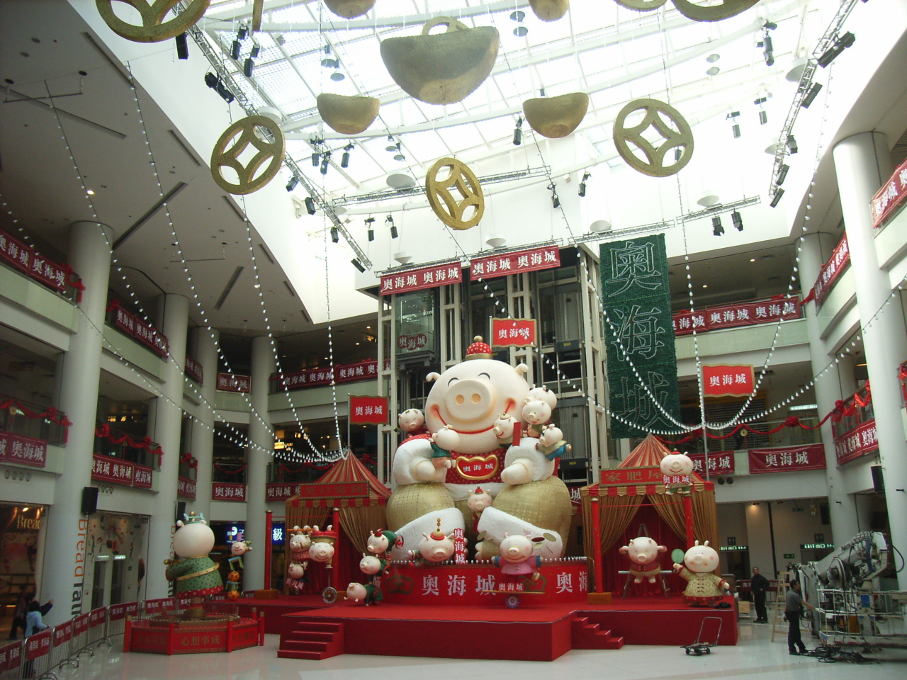 奧海城 (Olympian City)，是為zh:香港zh:九龍zh:大角咀zh:西九龍填海區內的建築群，屬於地鐵zh:奧運站一、二期物業發展項目，是九龍區主要zh:商場及zh:住宅之一，商場部分由zh:信和置業發展及管理，住宅部分則由信和置業及zh:地鐵有限公司共同發展及zh:物業管理。 Photo by User:OLAMB